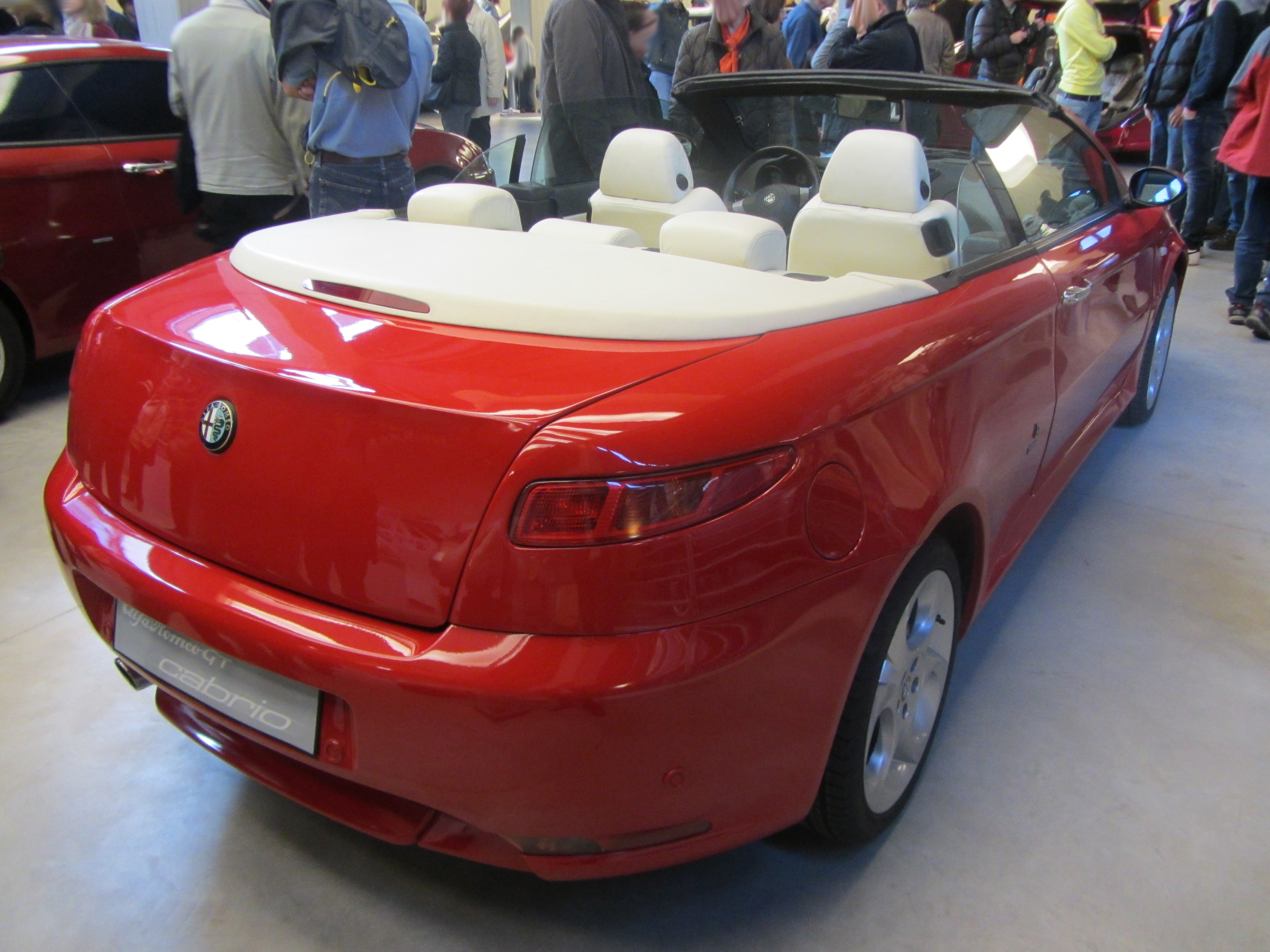 Alfa Romeo GT cabrio concept al Museo Bertone